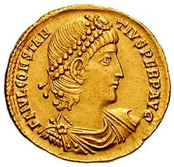 See File:Constantius II - solidus - antioch RIC viii 025.jpg.